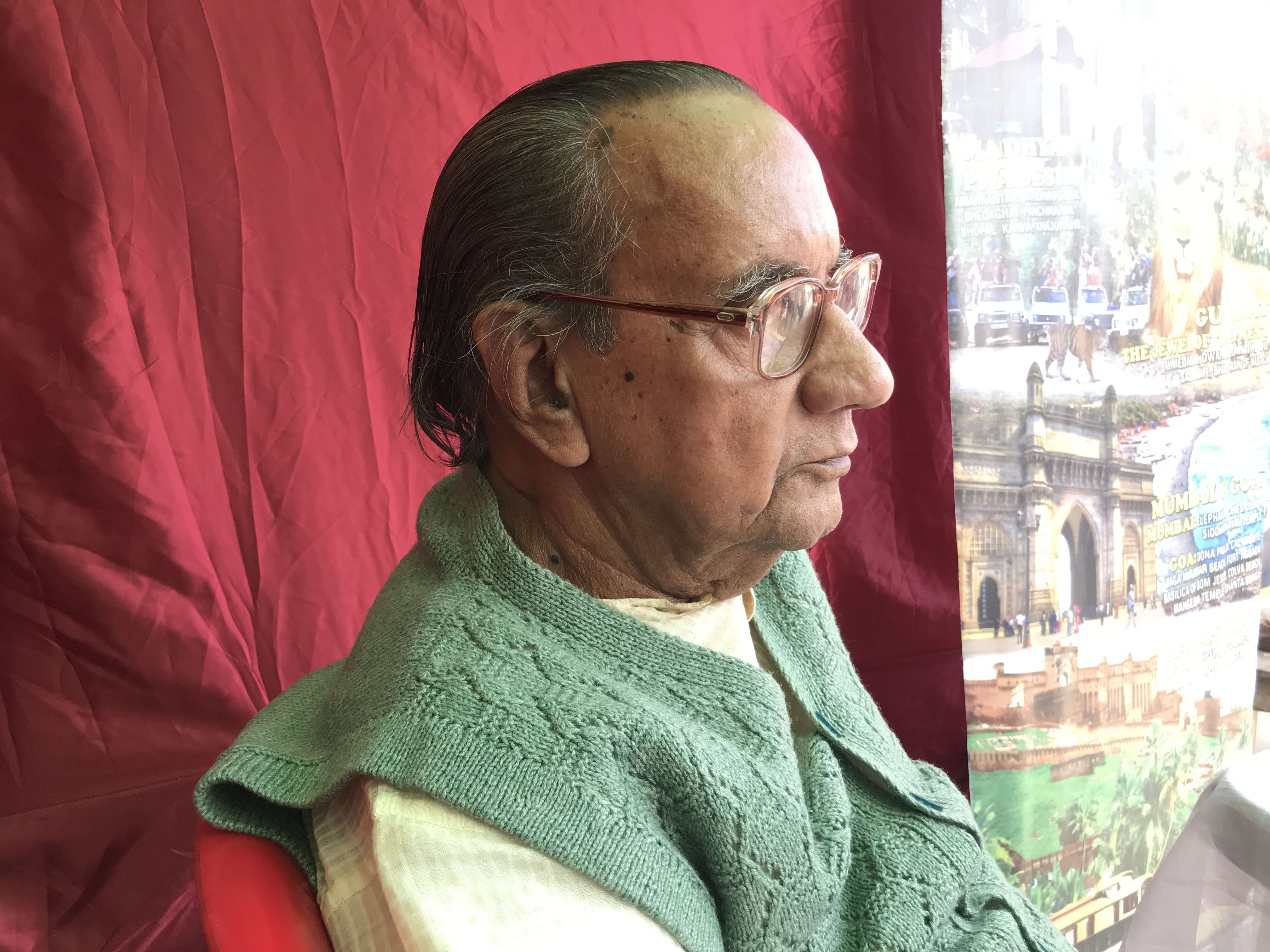 Bengali Writer Sudhir Chakraborty